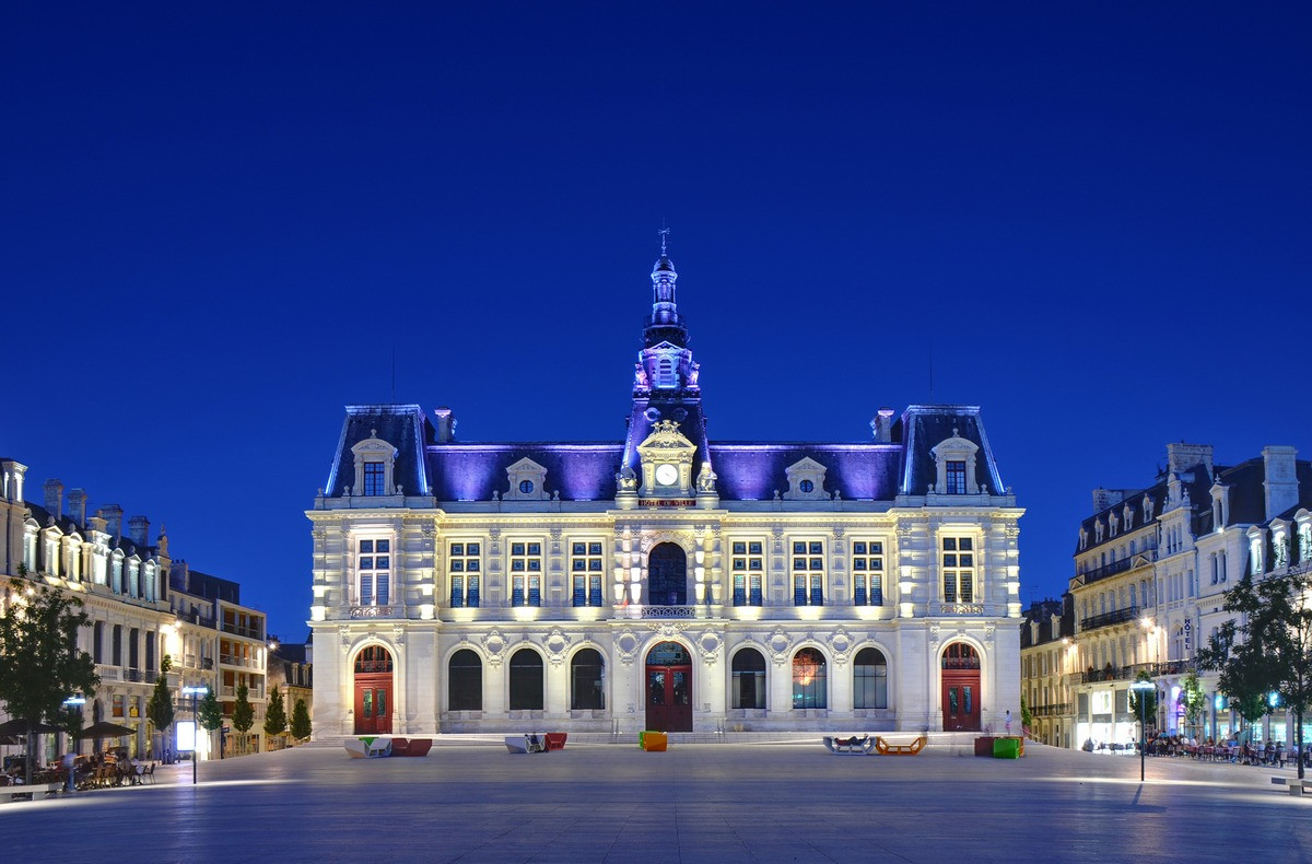 Hôtel de ville (Inscrit) .